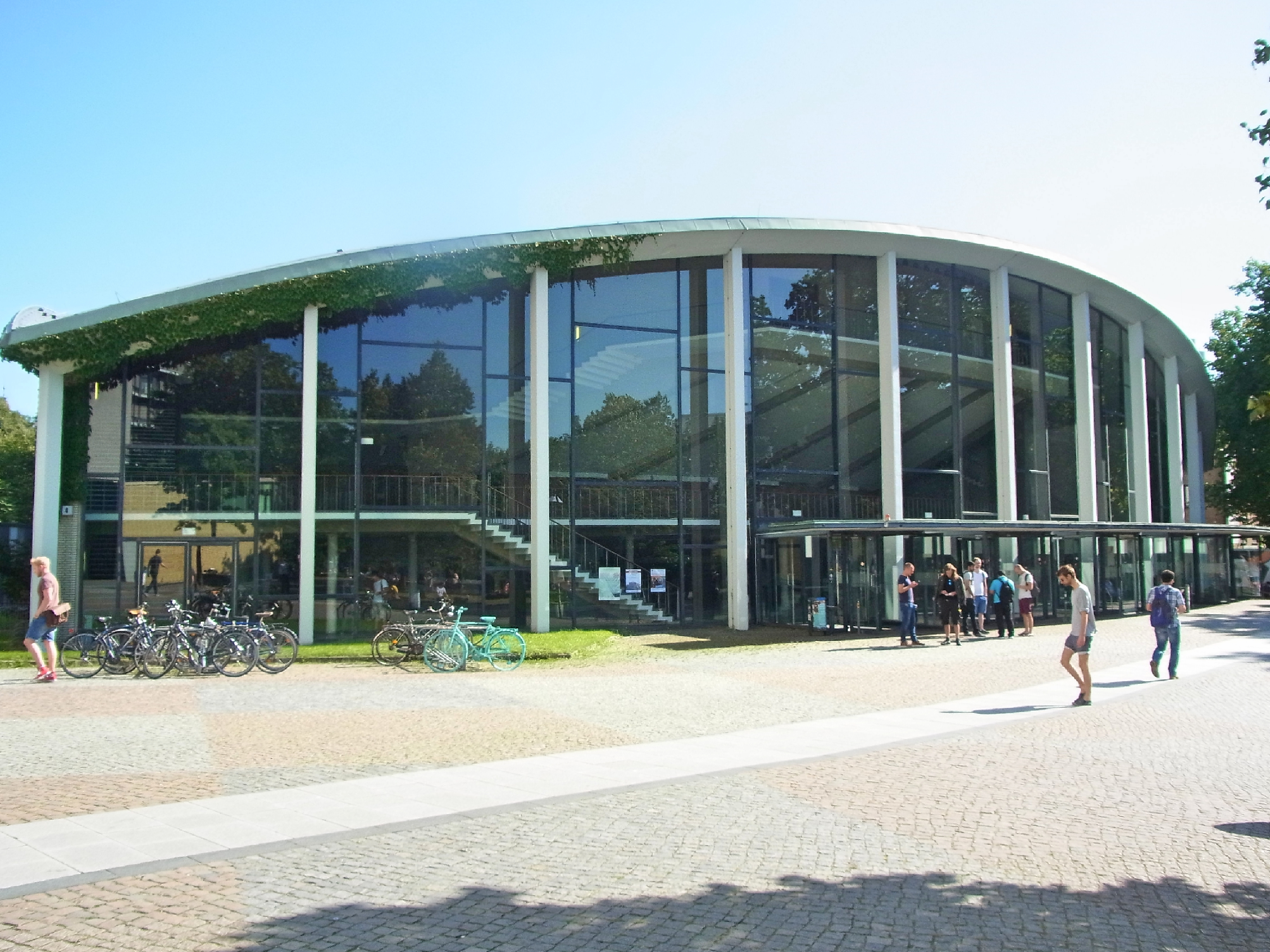 Das Auditorium Maximum der UNI Hamburg befindet sich auf dem Campus am Von-Melle-Park 4. Erbaut zwischen 1957 und 1959 nach Plänen von Bernhard Hermkes. Die Schalenkonstruktion soll dem Gebäude eine moderne Optik verleihen. Das Gebäude ist Hörsaal und zugleich Mittelpunkt des Campus-Geländes.This is a photograph of an architectural monument.